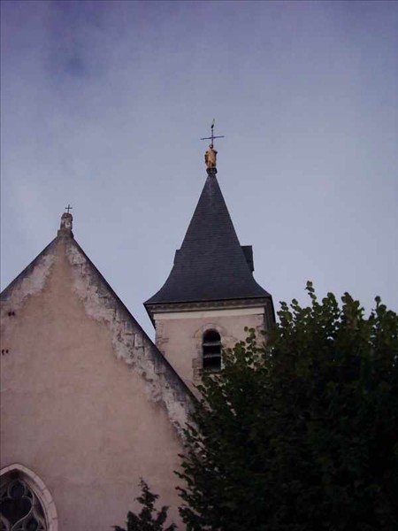 Chevet de l'église Saint-Vincent (Veuves, Loir-et-Cher) et clocher surmonté d'une statue de Saint Joseph